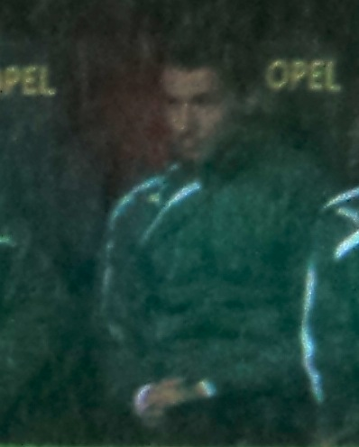 Kerim Zengin